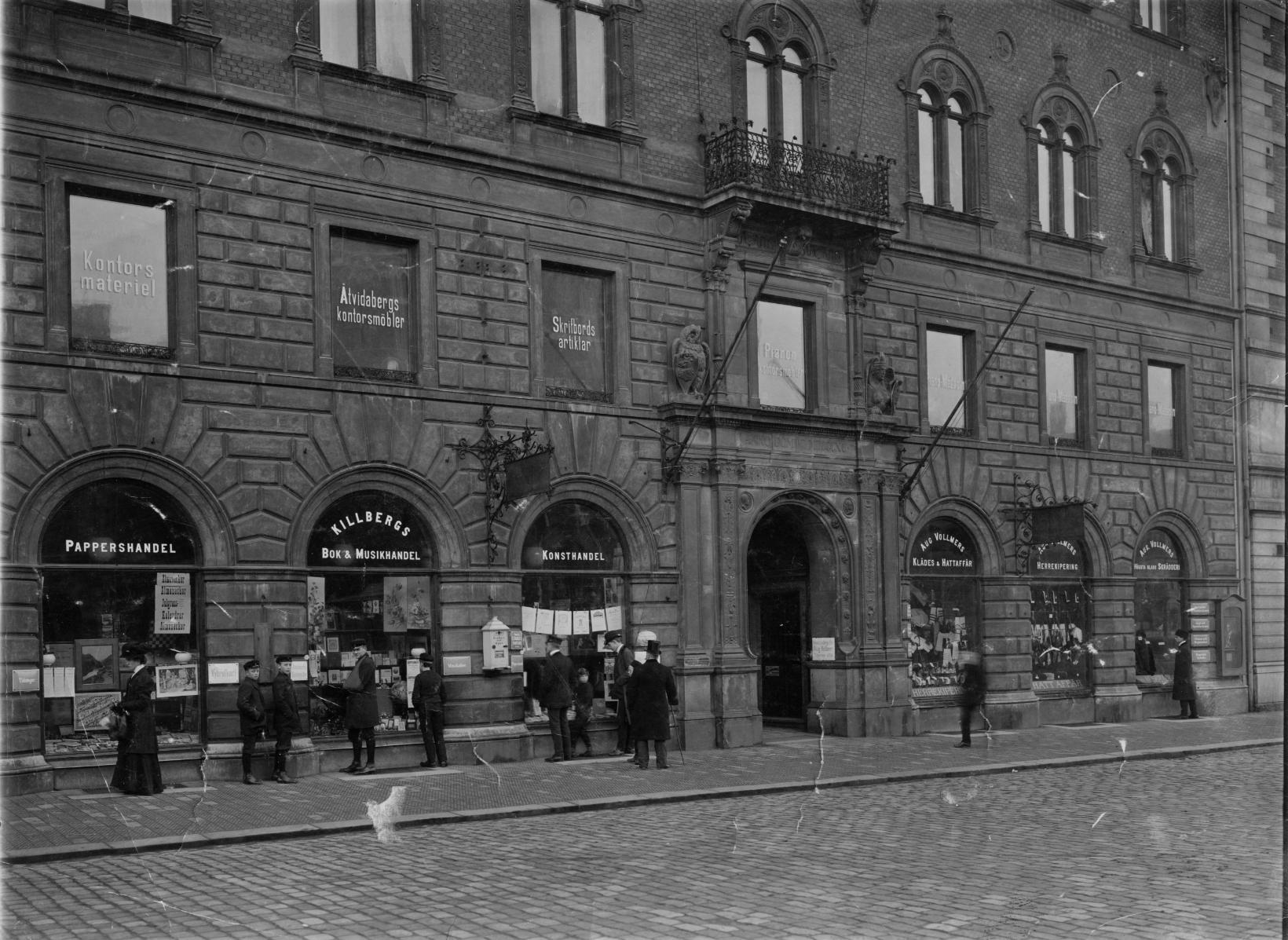 Bild från frimurarfastigheten och Killbergs Bokhandel vid sekelskiftet 1800/1900 talet